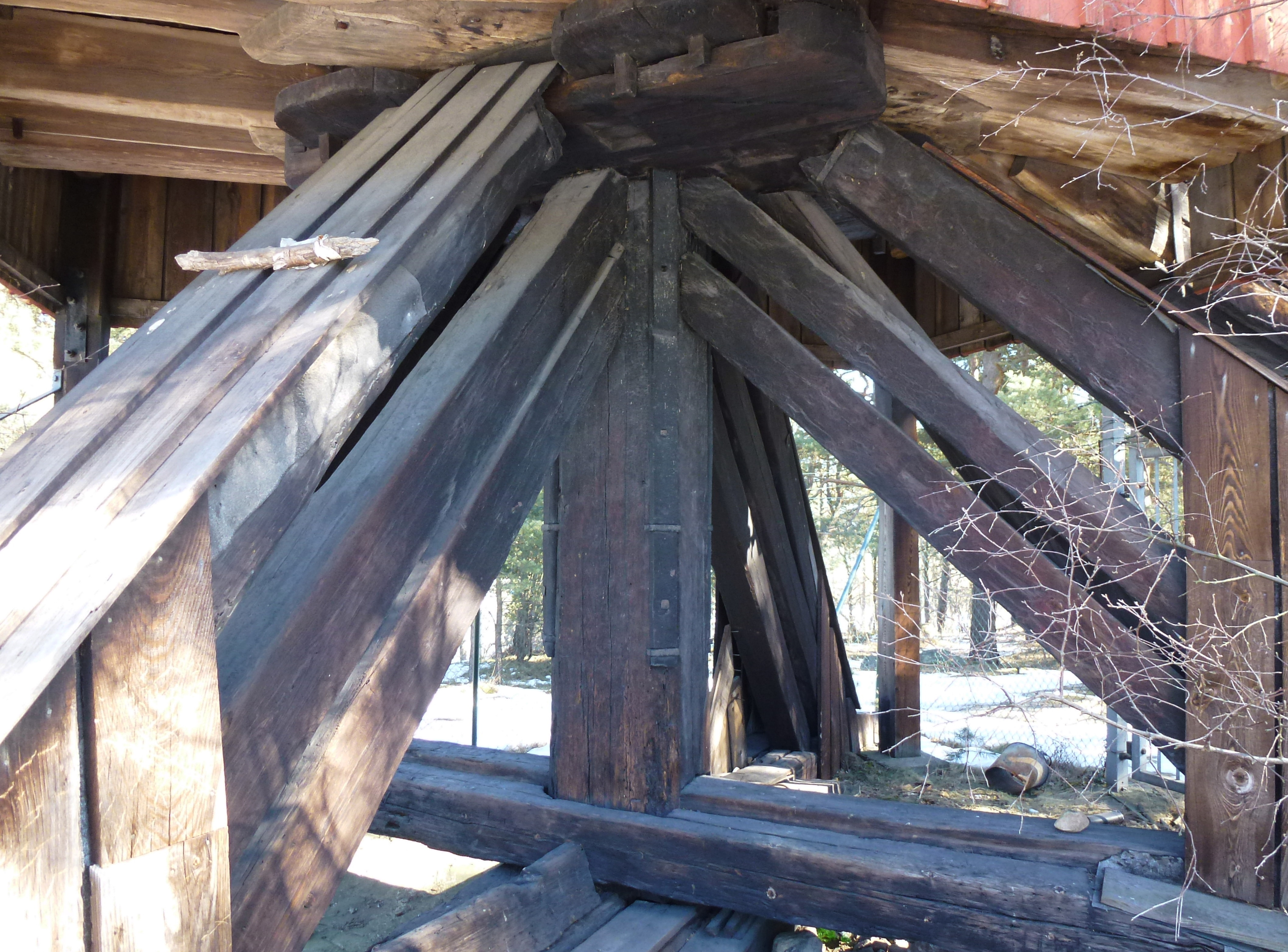 Rinkeby kvarnar "Stora Stampan"